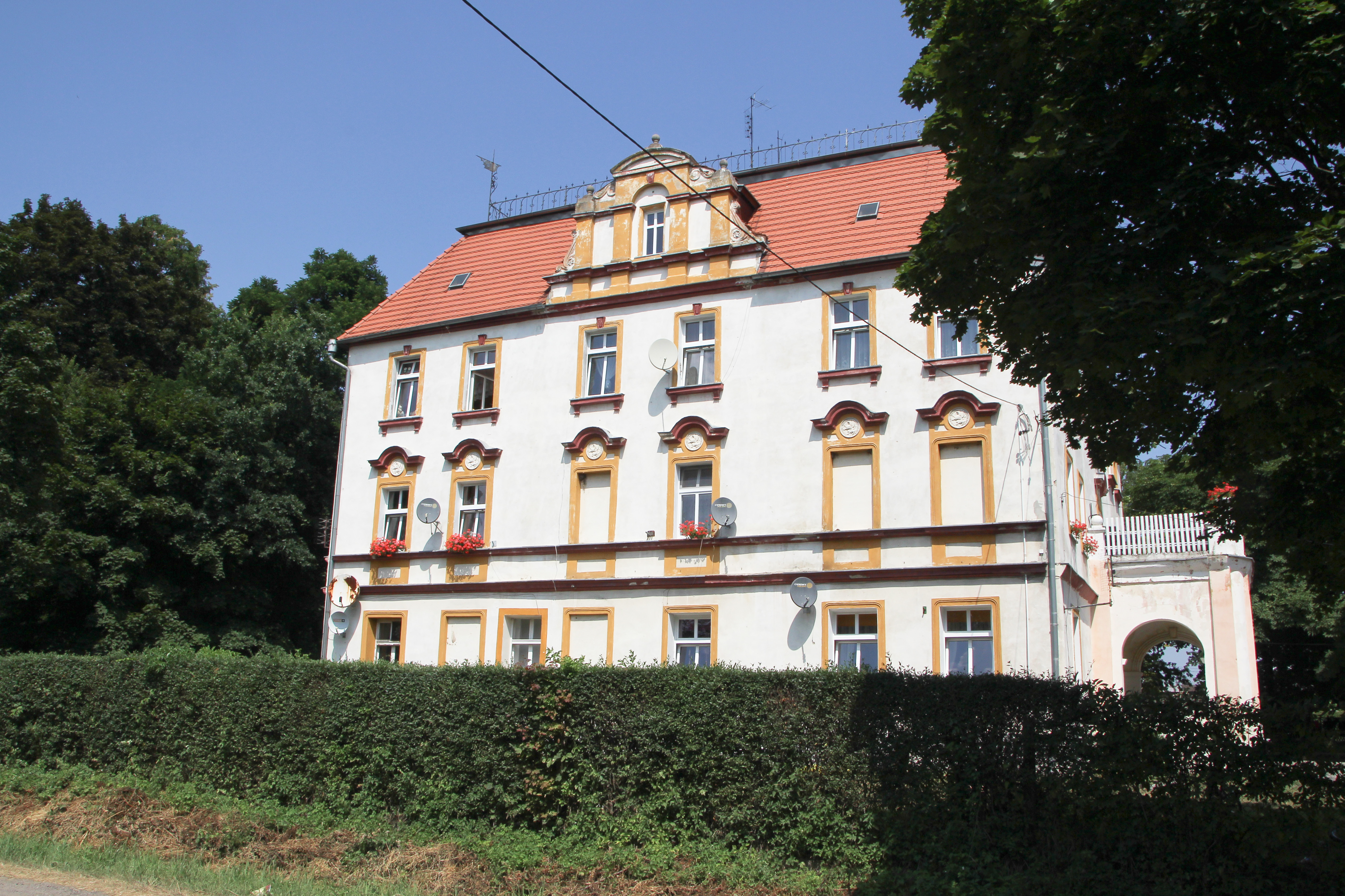 Ujeździec – wieś w Polsce, w województwie opolskim, w powiecie nyskim, w gminie Paczków.